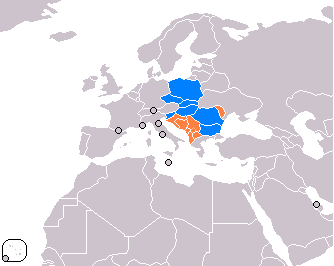 Statele membre CEFTA 2007